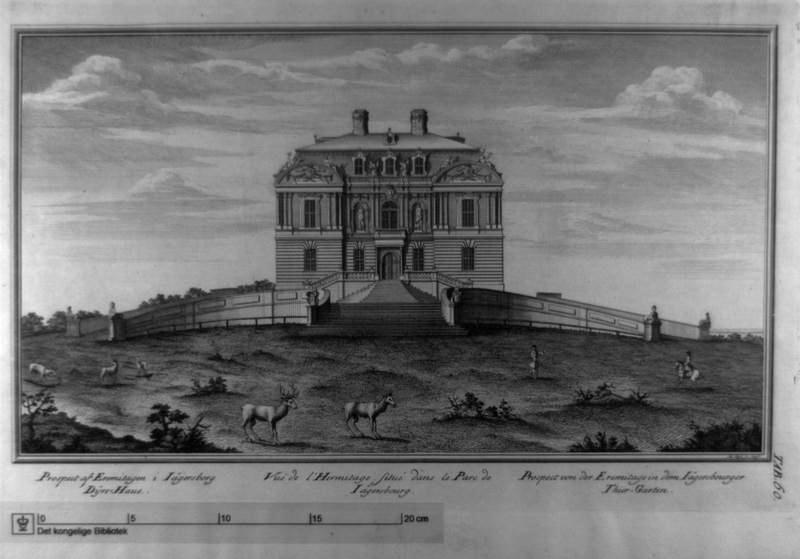 Prospect af Eremitagen af Michael Keyl. Tavle 60 i Lauritz de Thurahs Den danske Vitruvius II. Stukket mellem 1745 og 1749 da Keyl var i Danmark.